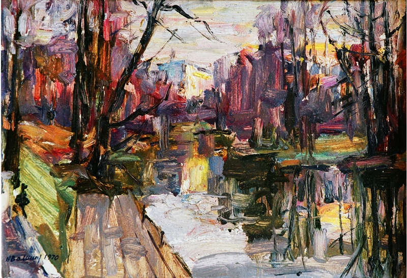 Санаторий «Ждановичи», Республика Беларусь, Минский р-н